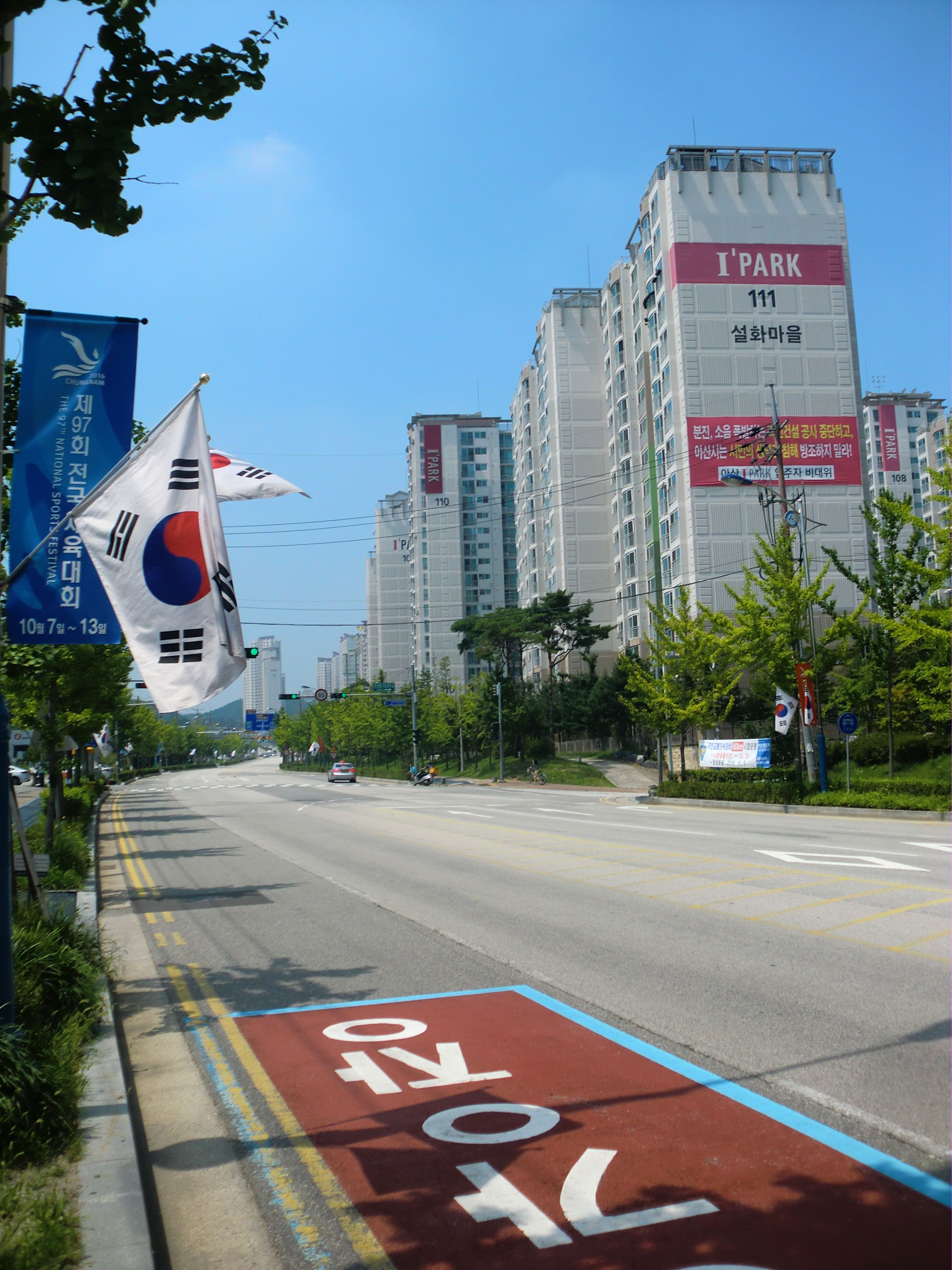 충청남도 아산시 (아산경찰서부근)